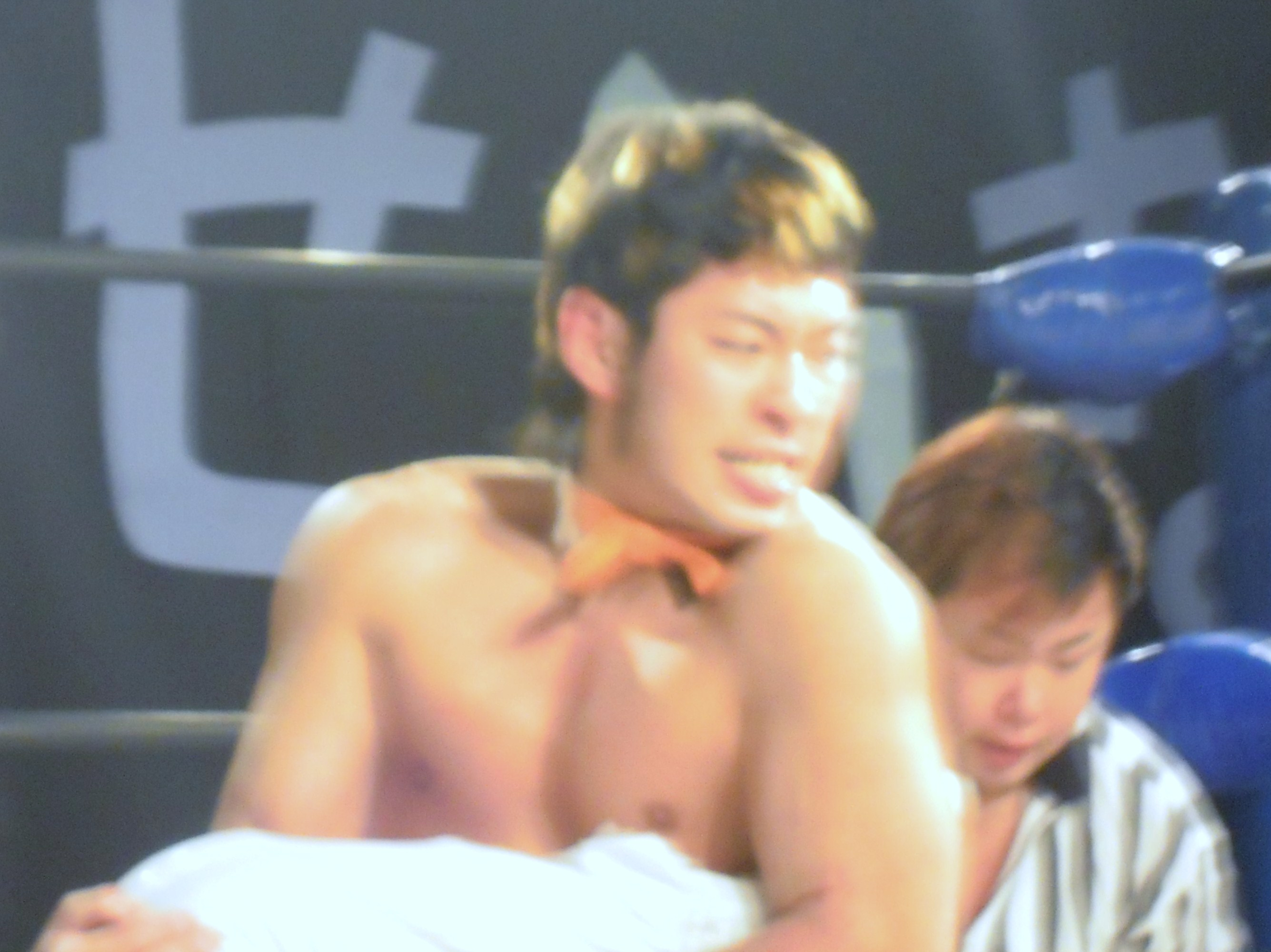 マサ高梨 2010年3月20日アイスリボン 投稿者撮影